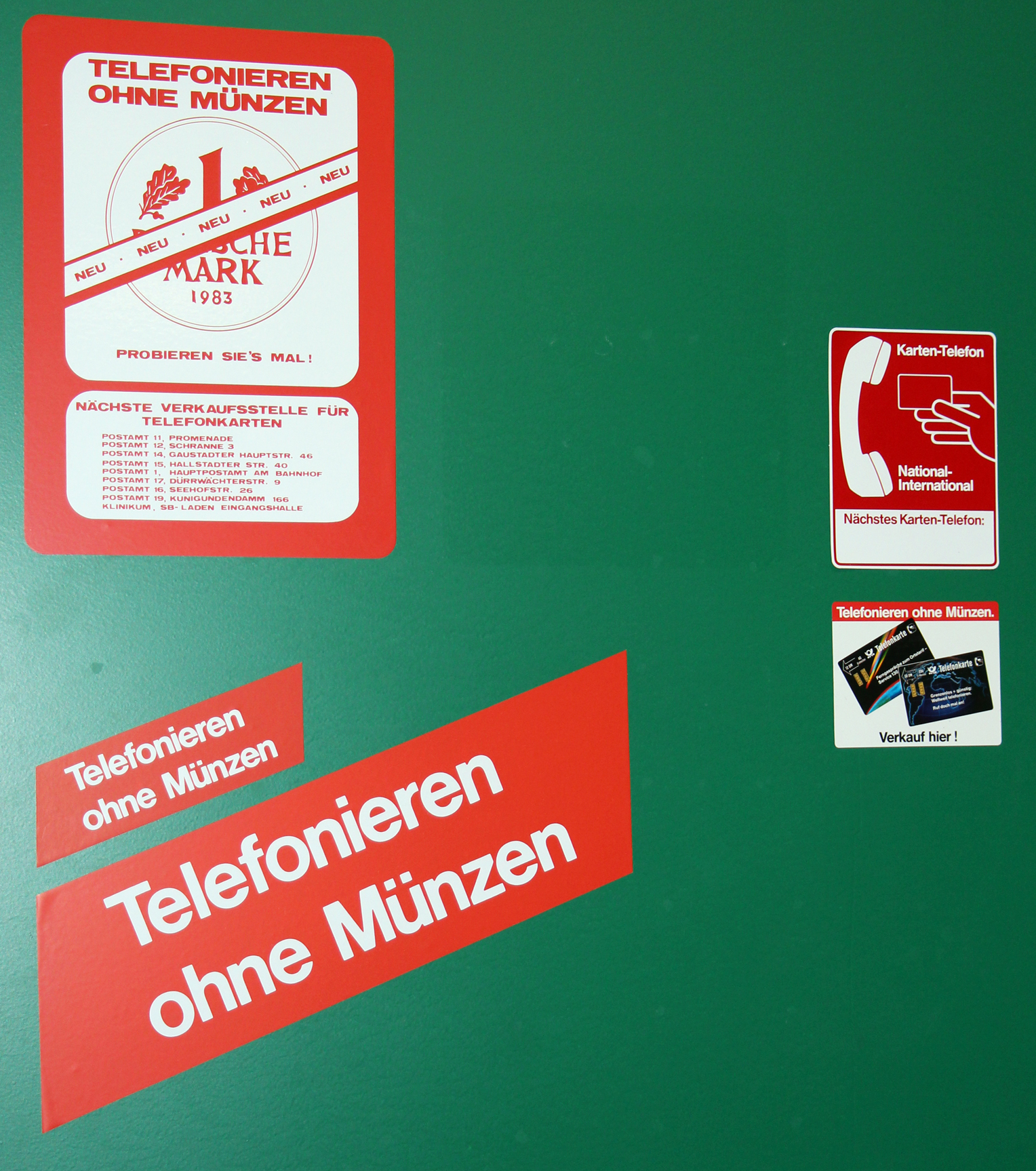 verschiedene Aufkleber für Telefonkarten-Kartentelefone "Telefonieren ohne Münzen" / Telefonieren mit Karte. Der Aufkleber oben links muss aus dem Versuchsgebiet Bamberg stammen